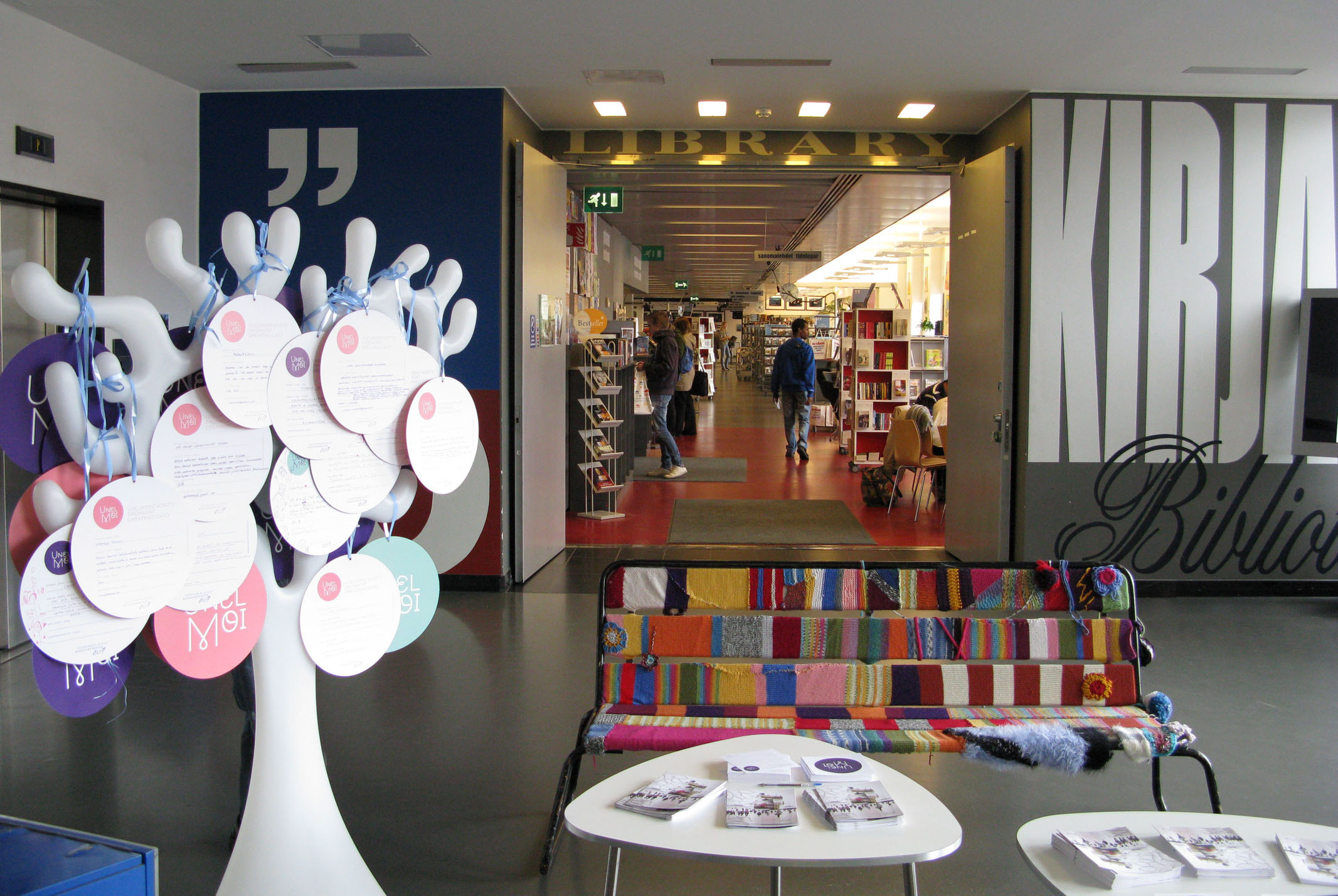 Kirjasto 10:n sisäänkäynti ja Unelmien puu